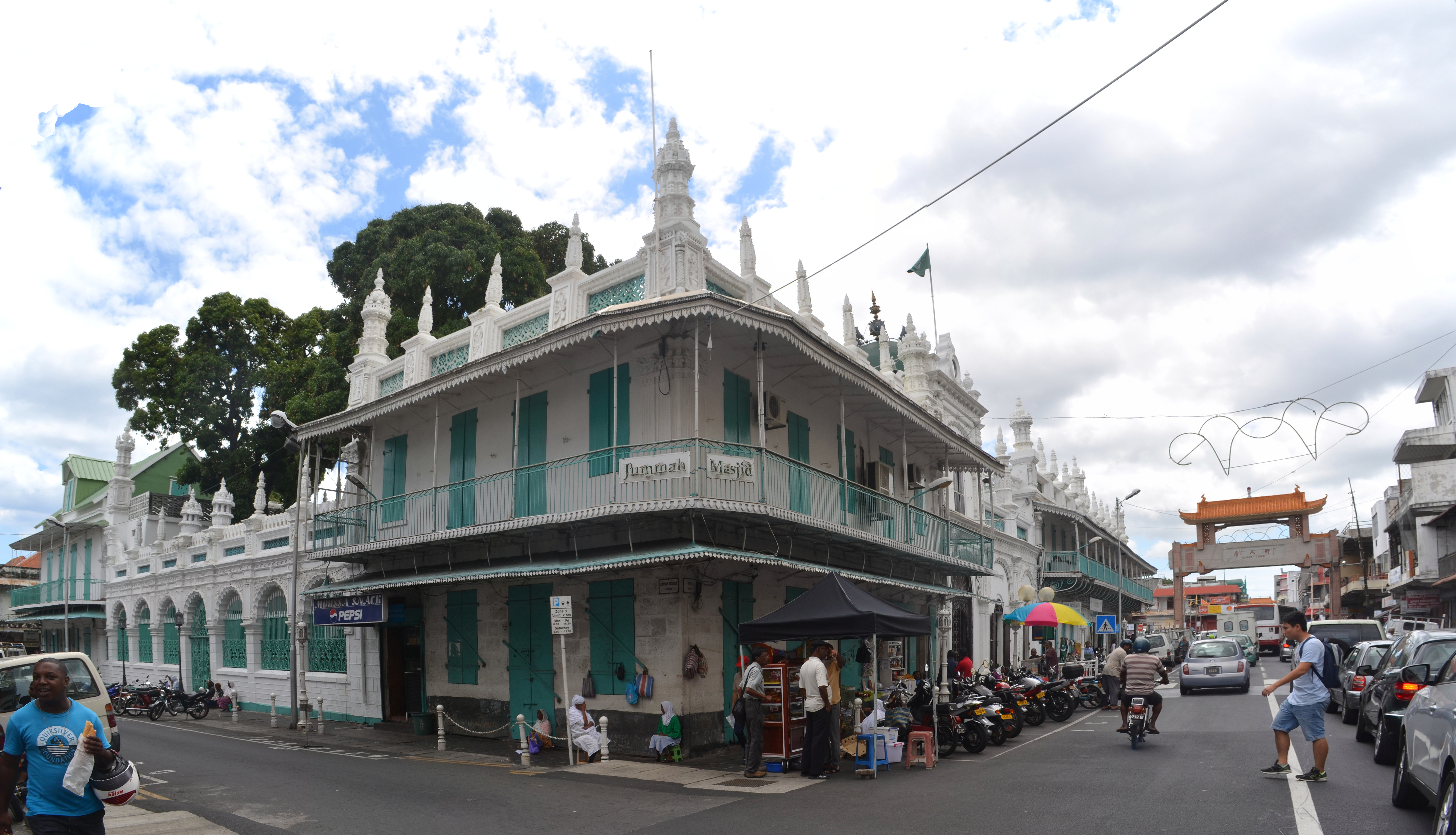 Port Louis, Jummah Masjeed